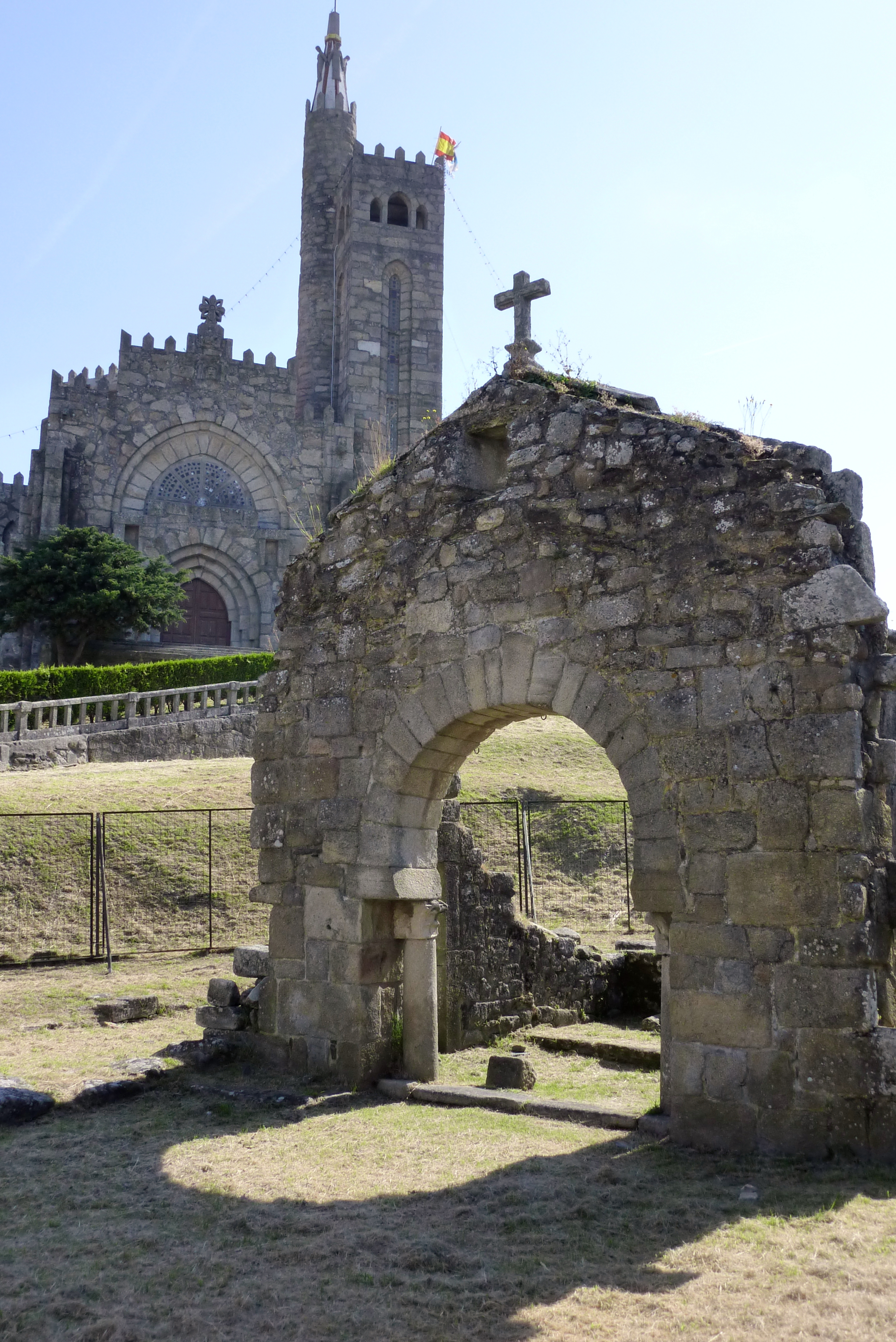 Ruinen der westgotischen Kirche, ehemalige Pfarrkirche San Juan in Panxón (Nigrán) in der spanischen Provinz Pontevedra (Galicien), im Hintergrund die neoromanische/neogotische Kirche Templo Votivo do Mar